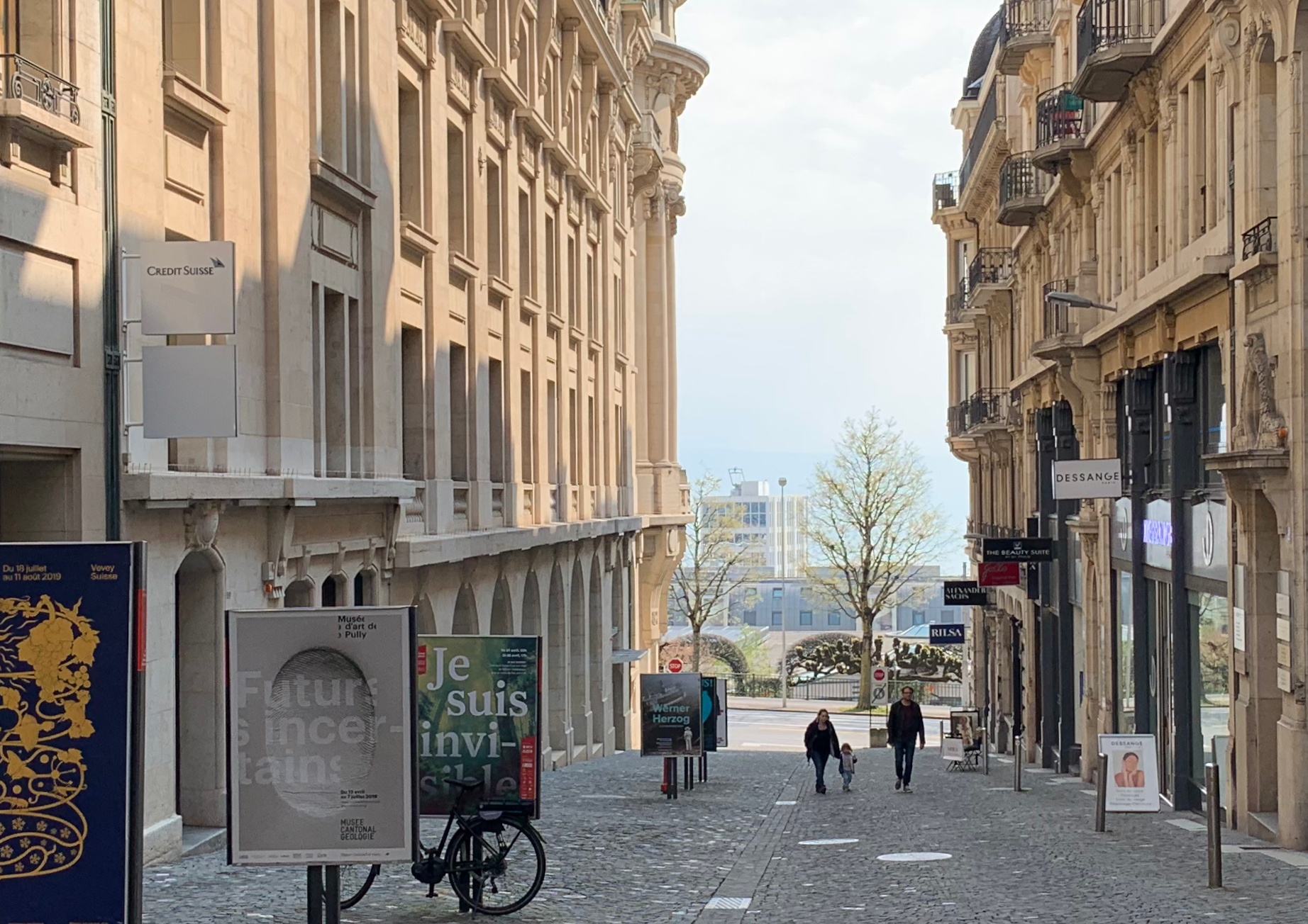 La rue du Lion-d'Or à Lausanne, en avril 2019.